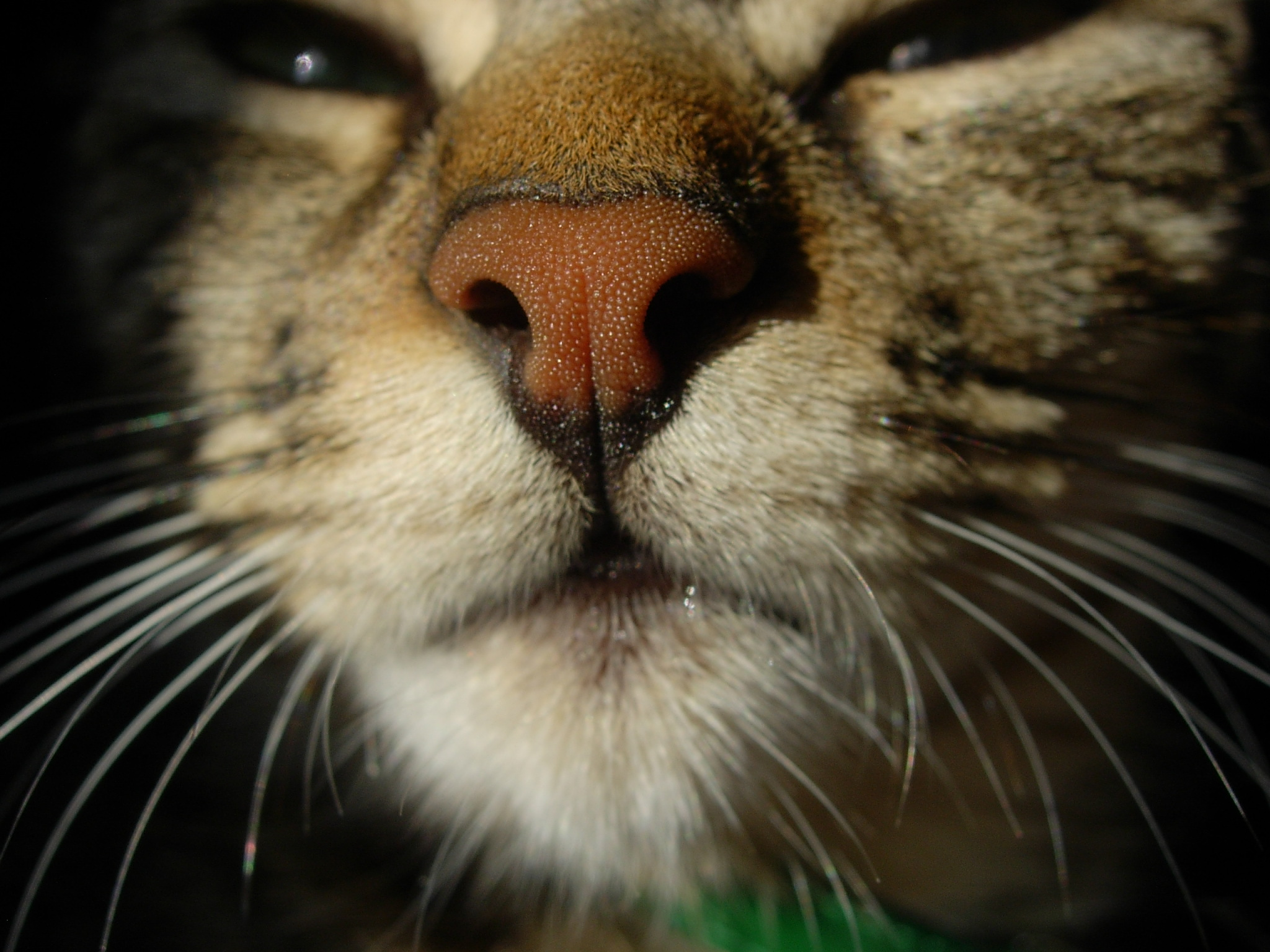 cat rhinarium